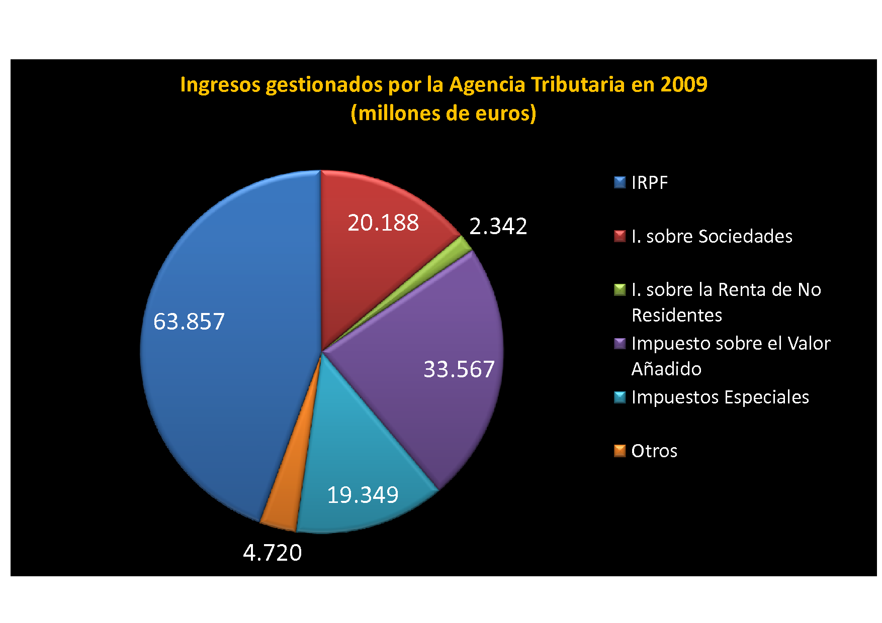 Ingresos gestionados por la Agencia Tributaria en 2009